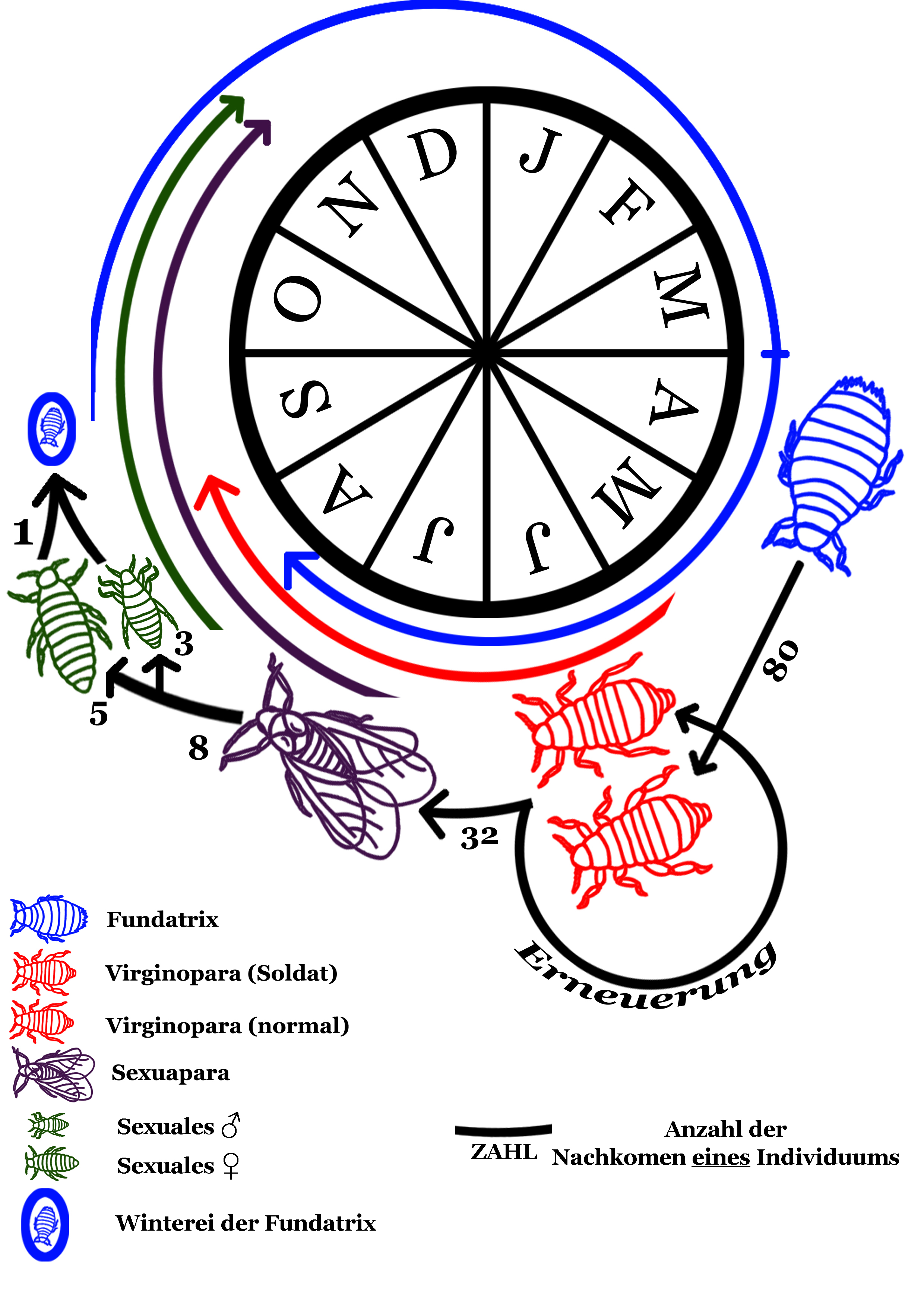 Kreislaufmodell des Vorkommens der P.s. Generationen über ein Jahr. Erstellt aus eigenen Zeichnungen mit Adope Photoshop (Originalfile besitze ich)